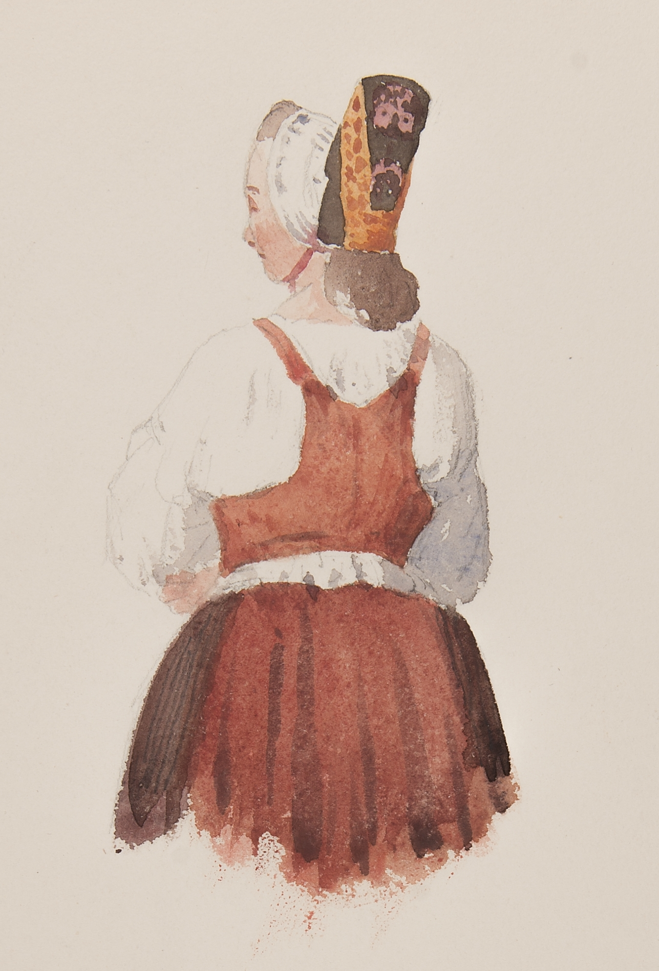 Dräkt. Kvinna bakifrån i halvfigur, Häverödräkt. Akvarell i storformat av Joseph Magnus Stäck. Depicted place: Sweden (Q34) (Land), Dalarna (Q205218) (Landskap), Mora (Socken/Stad)